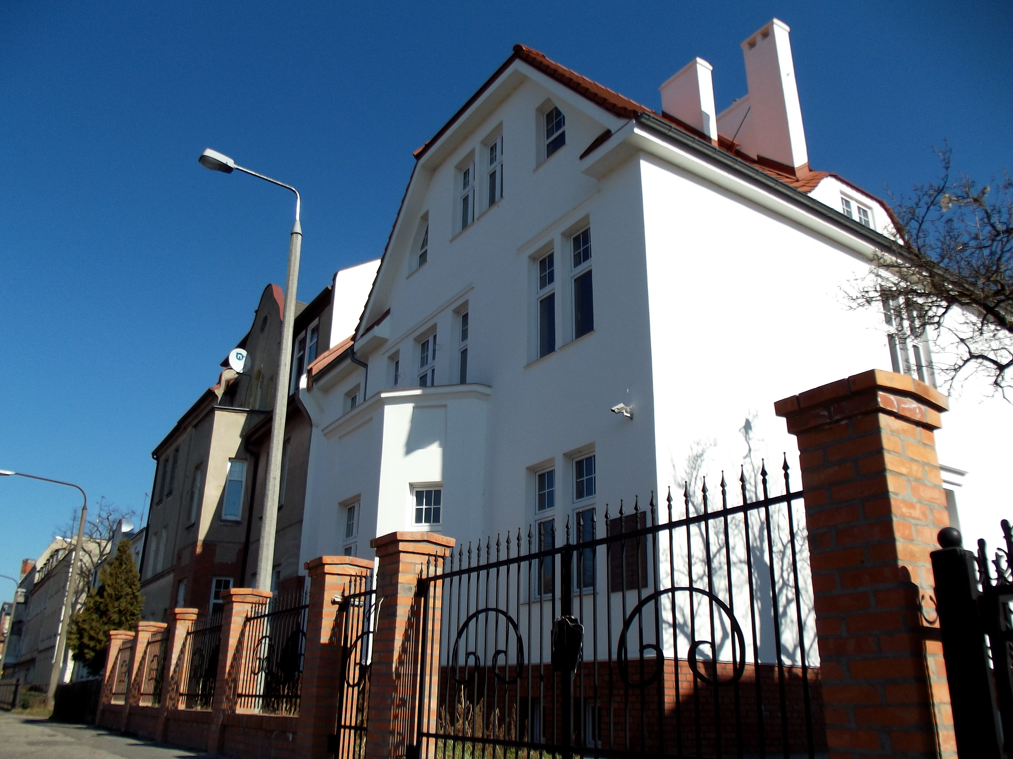 Kamienica przy ulicy Krakowskiej 11 w której w latach 1923-27 mieszkał Błogosławiony Michał Kozal Biskup i Męczennik Patron Diecezji Bydgoskiej